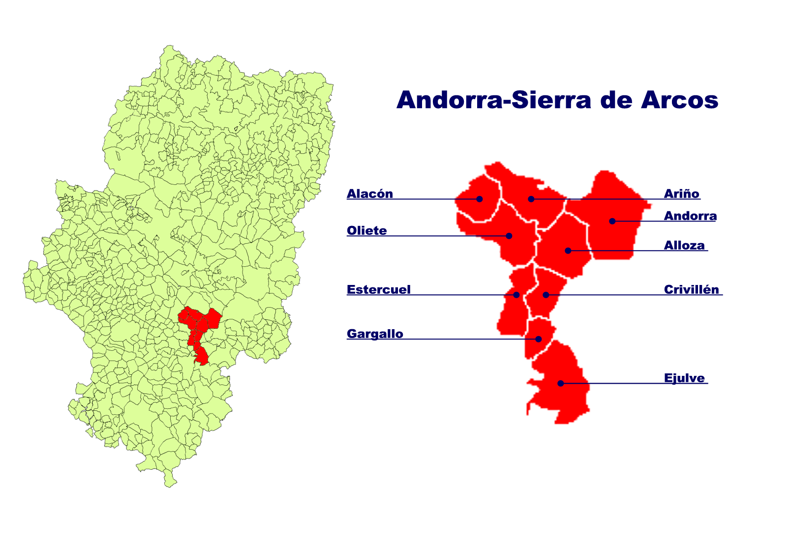 Comarca de Andorra - Sierra de Arcos Creado el 02.11.2005 por Ecelan en base a Image:Aragon municipalities.png